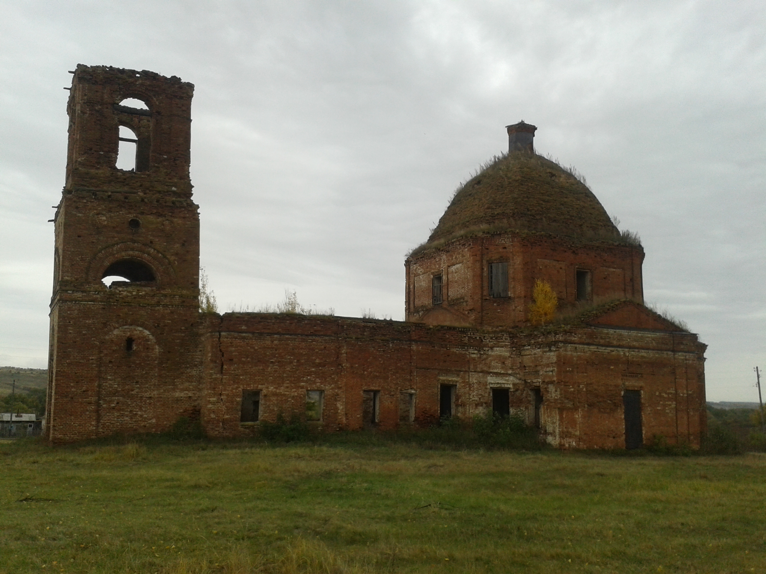 Руины церкви во имя Владимирской иконы Божьей Материв селе Суворово Болотниковского сельсовета Лунинского района Пензенской области, XVIII век. Церковь была построена в 1791-1793 годах на средства А. В. Суворова. Суворов лично присутствовал на закладке её фундамента.